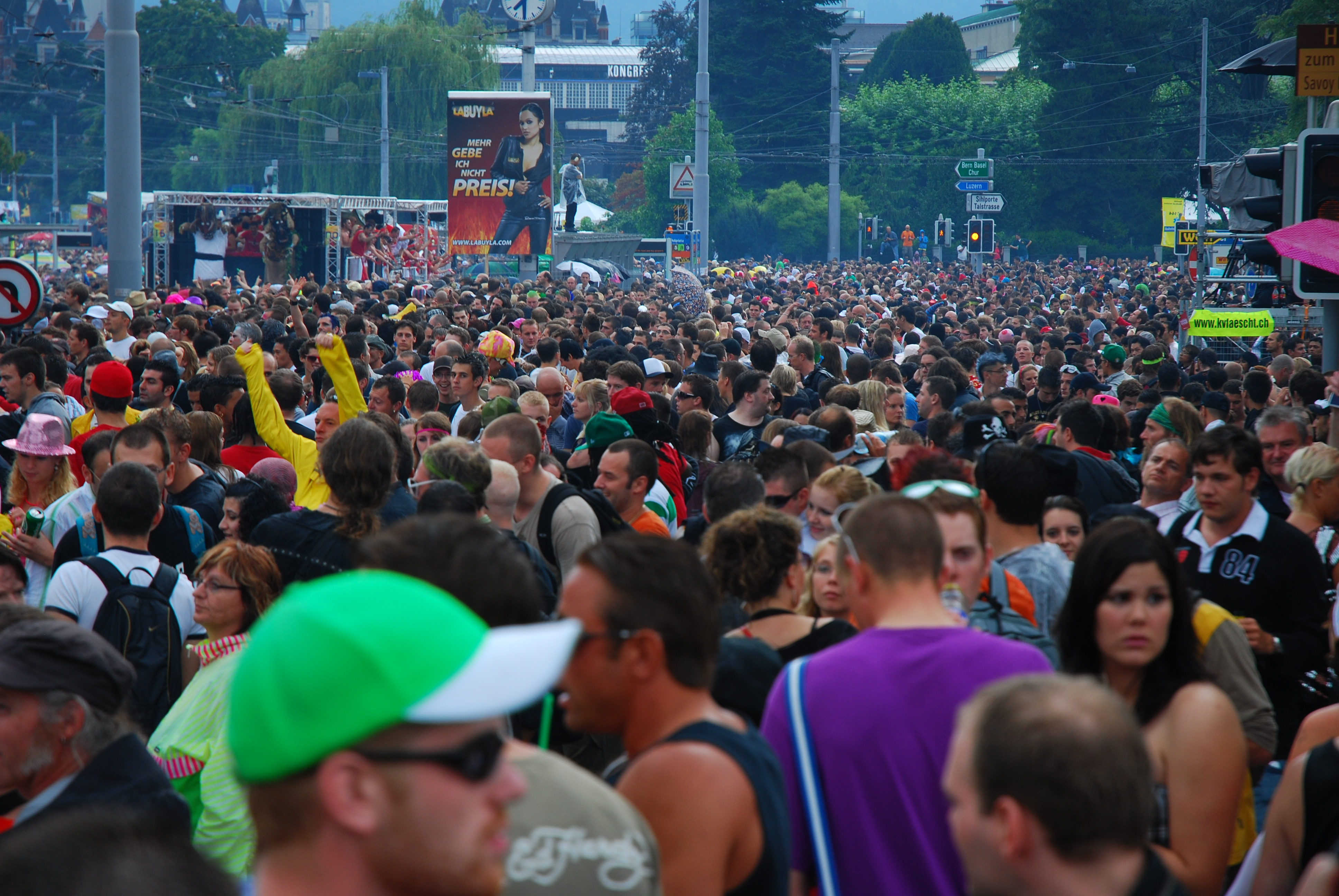 Zürich Street Parade 2009.